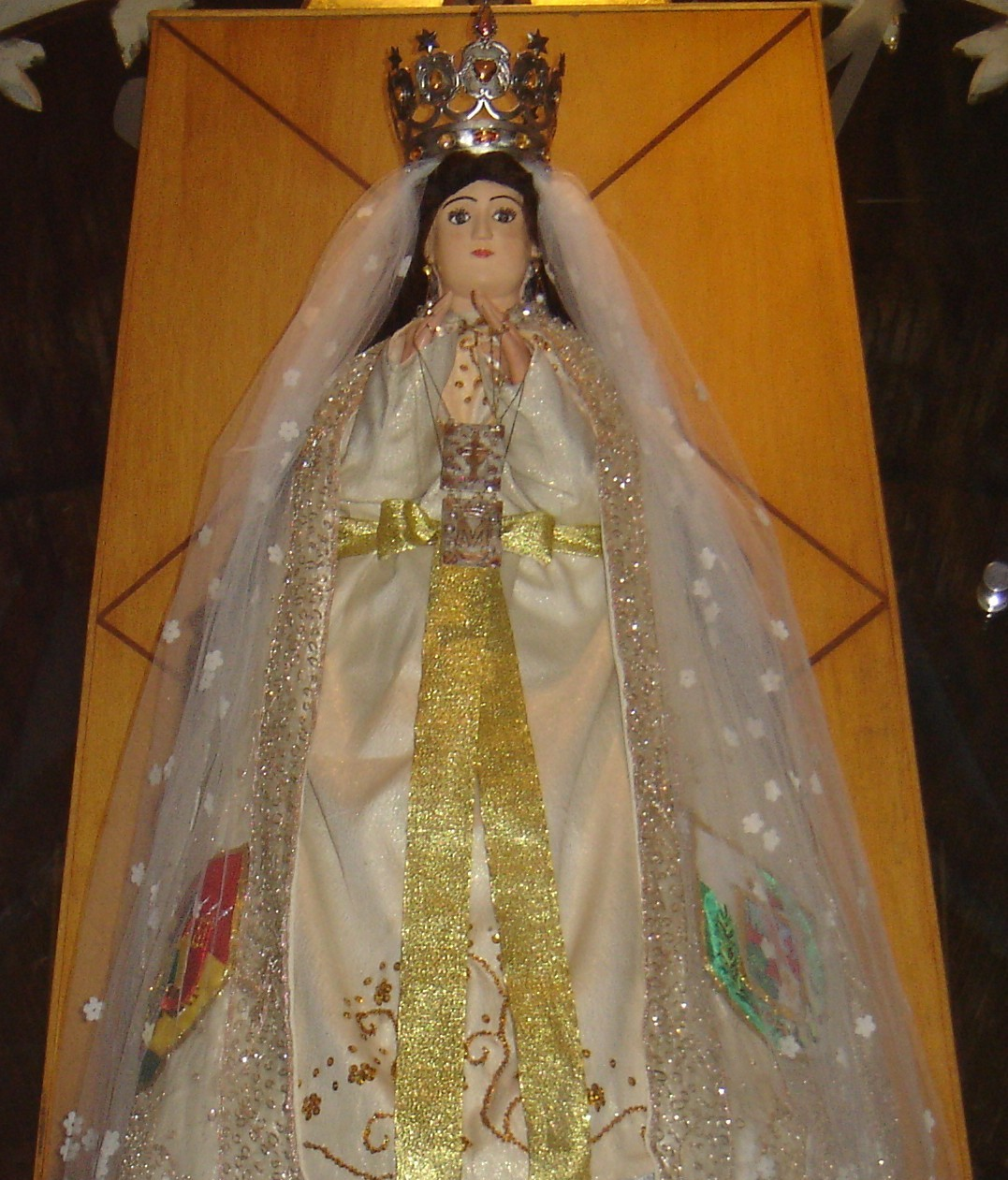 Runa Simi: Llump'aq Qullana Mariya Qutuqamanta, Santa Kruz, Wuliwya suyupi.